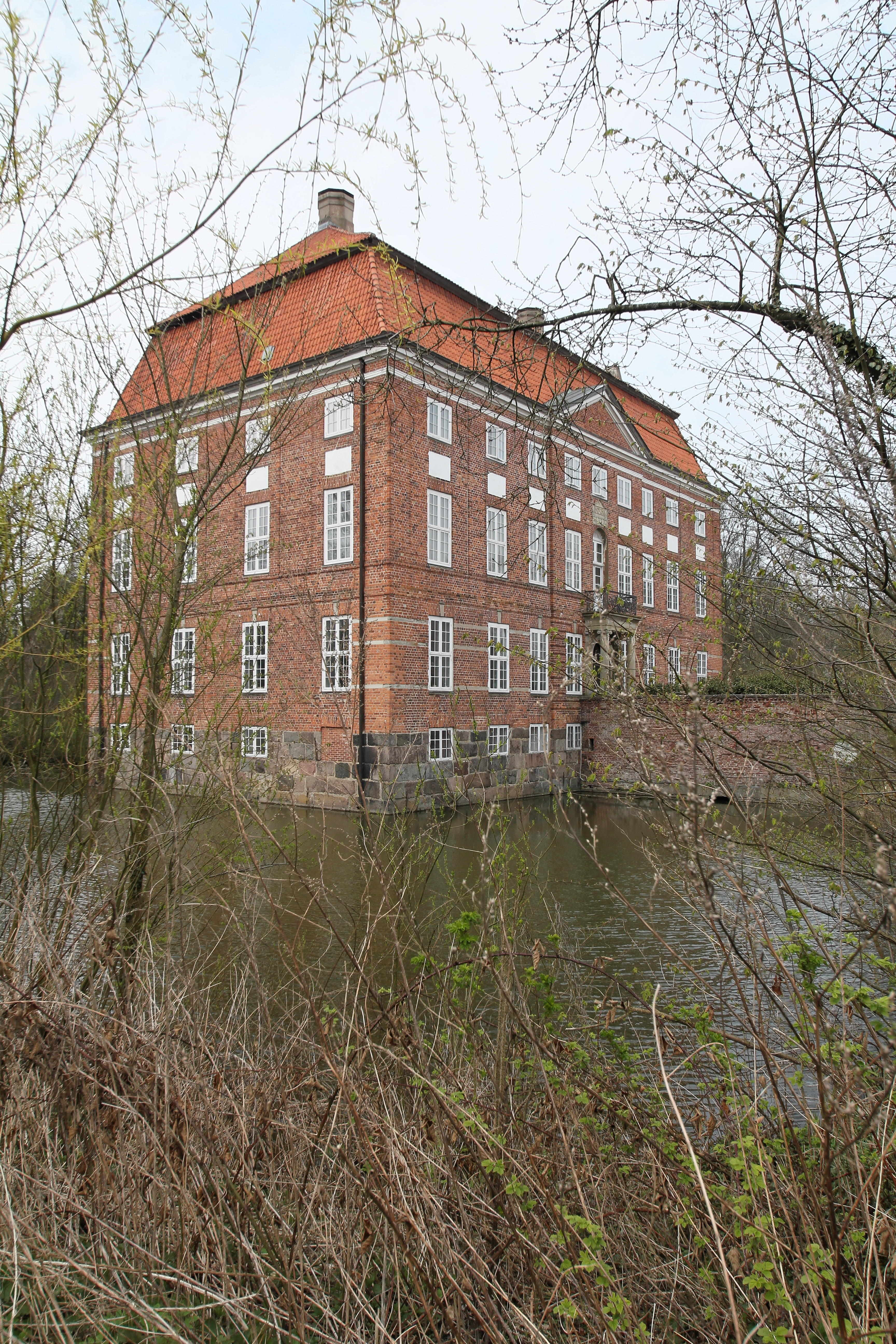 Waabs, Gut Ludwigsburg; Haupthaus Seitenansicht